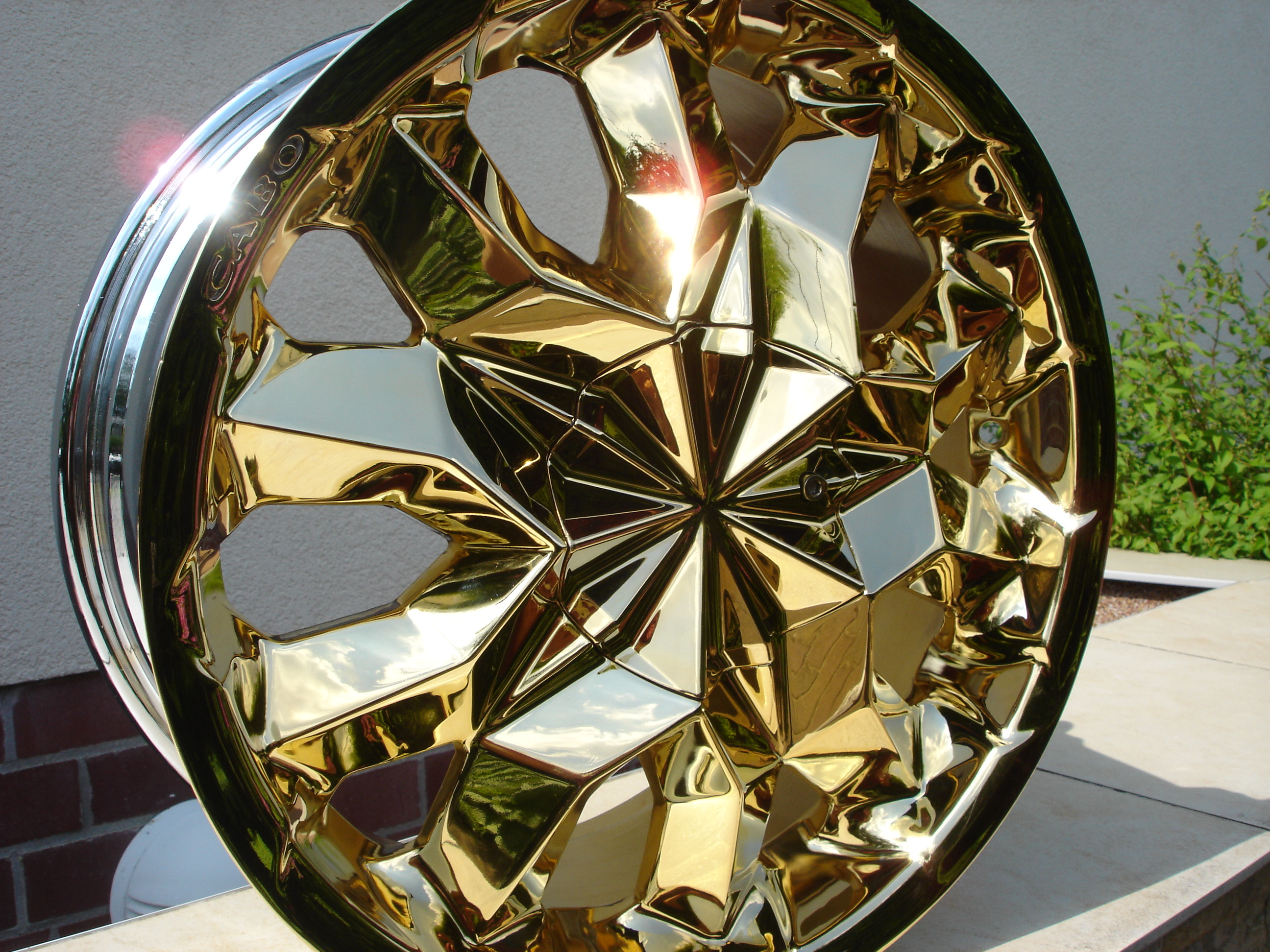 Foto einer mit 999er Feingold galvanisierten Autofelge (Tampongalvanik).